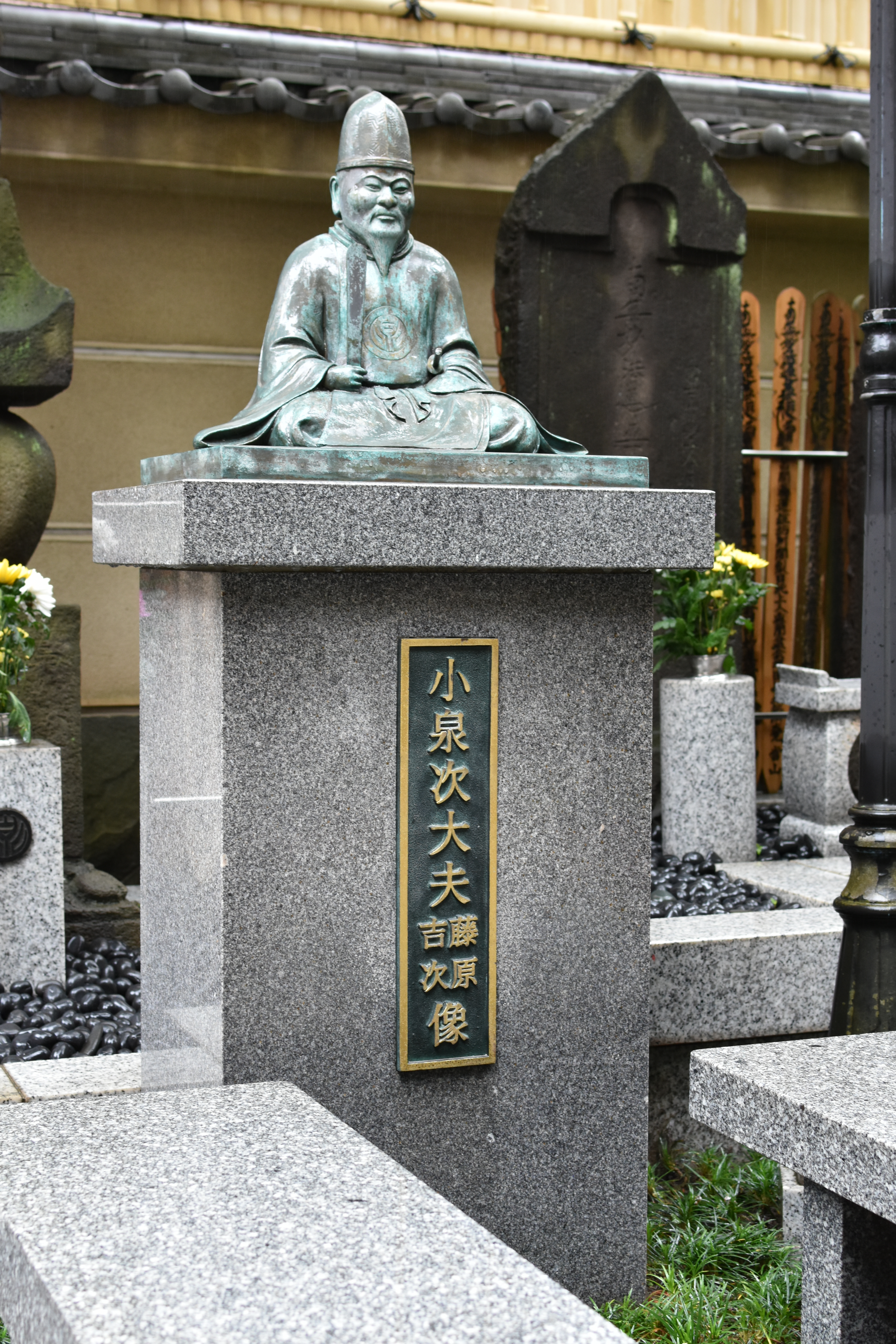 小泉次大夫の像（川崎区宮前町「妙遠寺」境内、2019年7月）